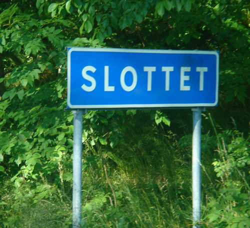 Ortnamnsskylt: Slottet